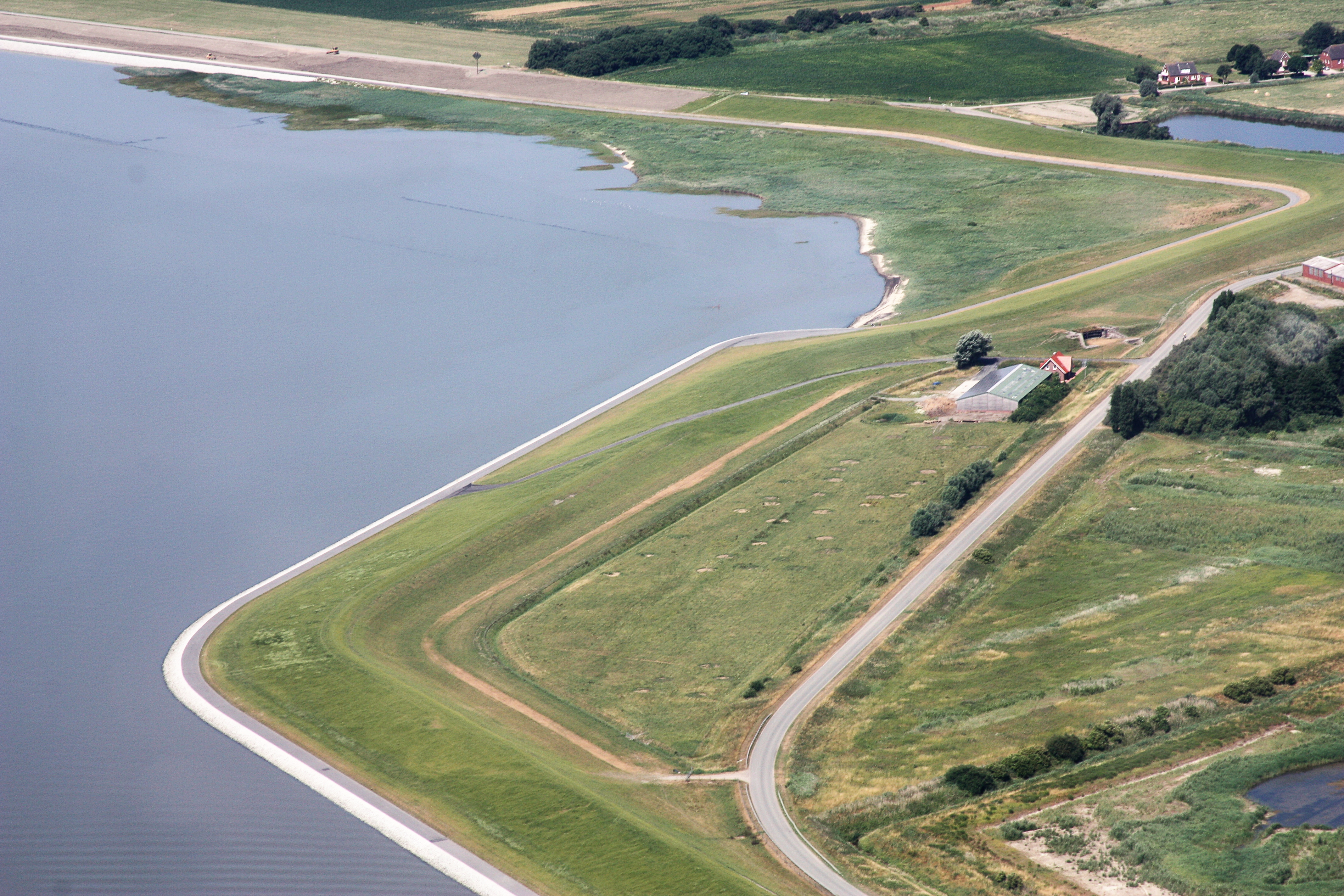 Flug von Emden zum Pilsumer Leuchtturm; Flughöhe 1500 ft; Juli 2010; Originalfoto nachbearbeitet: Tonwertkorrektur und Bild geschärft mit Hochpassfilter